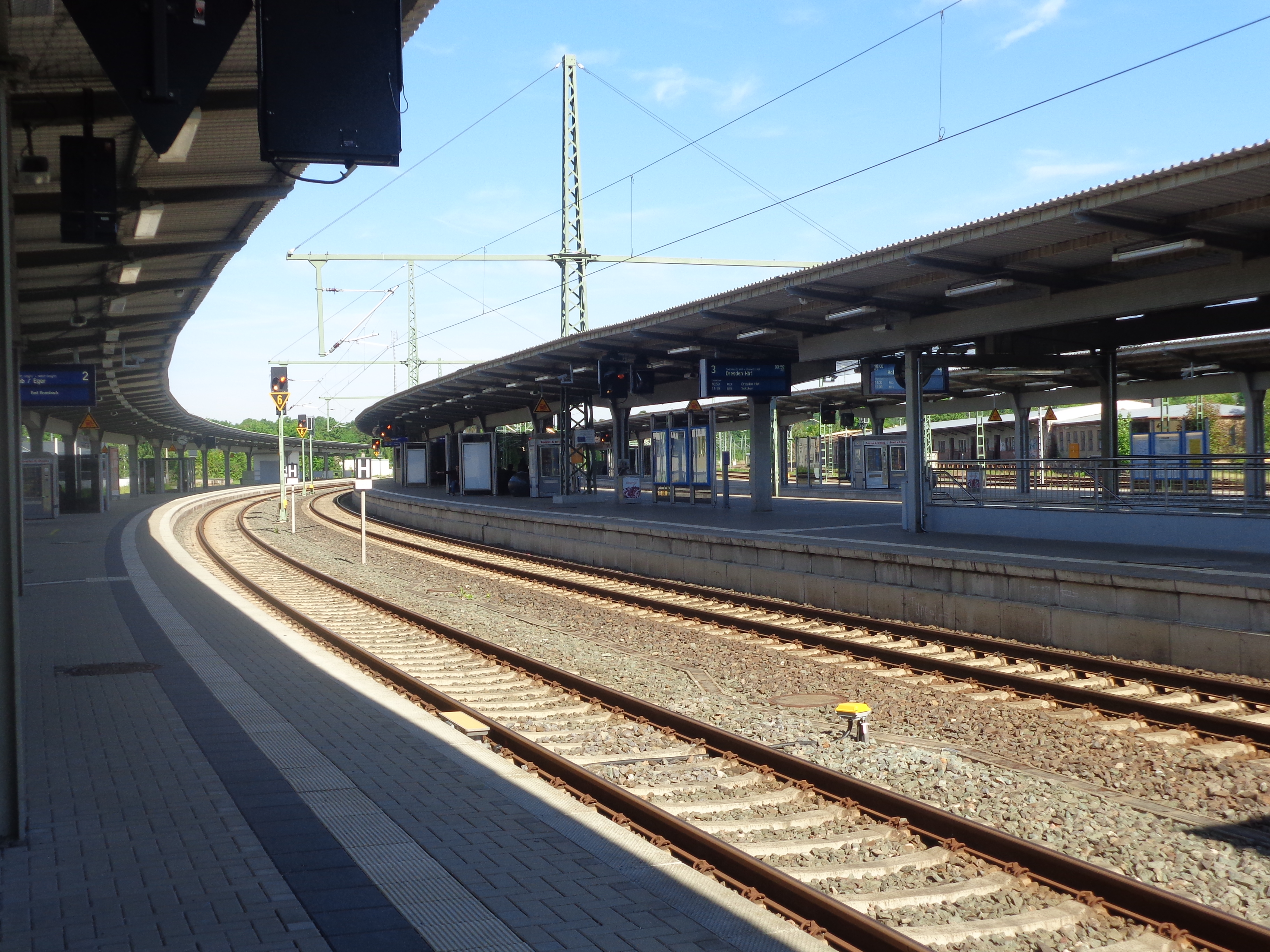 Bahnsteige Plauen oberer Bahnhof